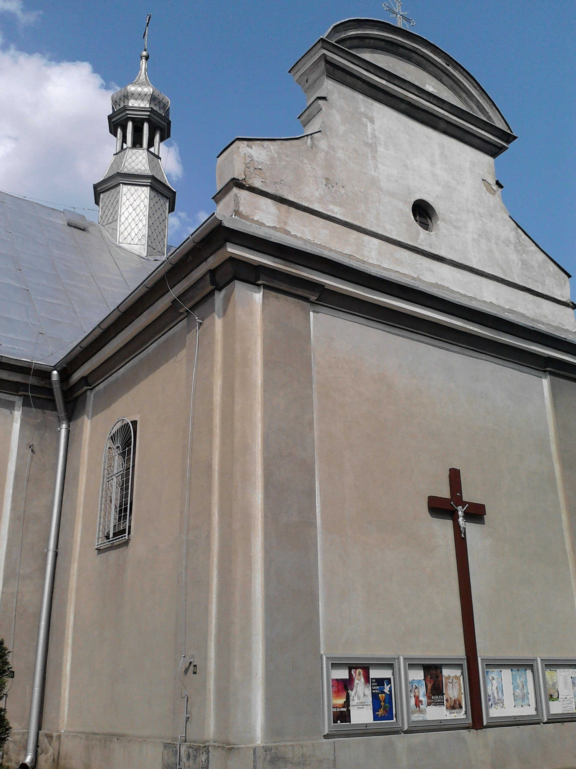 Kościół w Moszczenicy - kaplica boczna